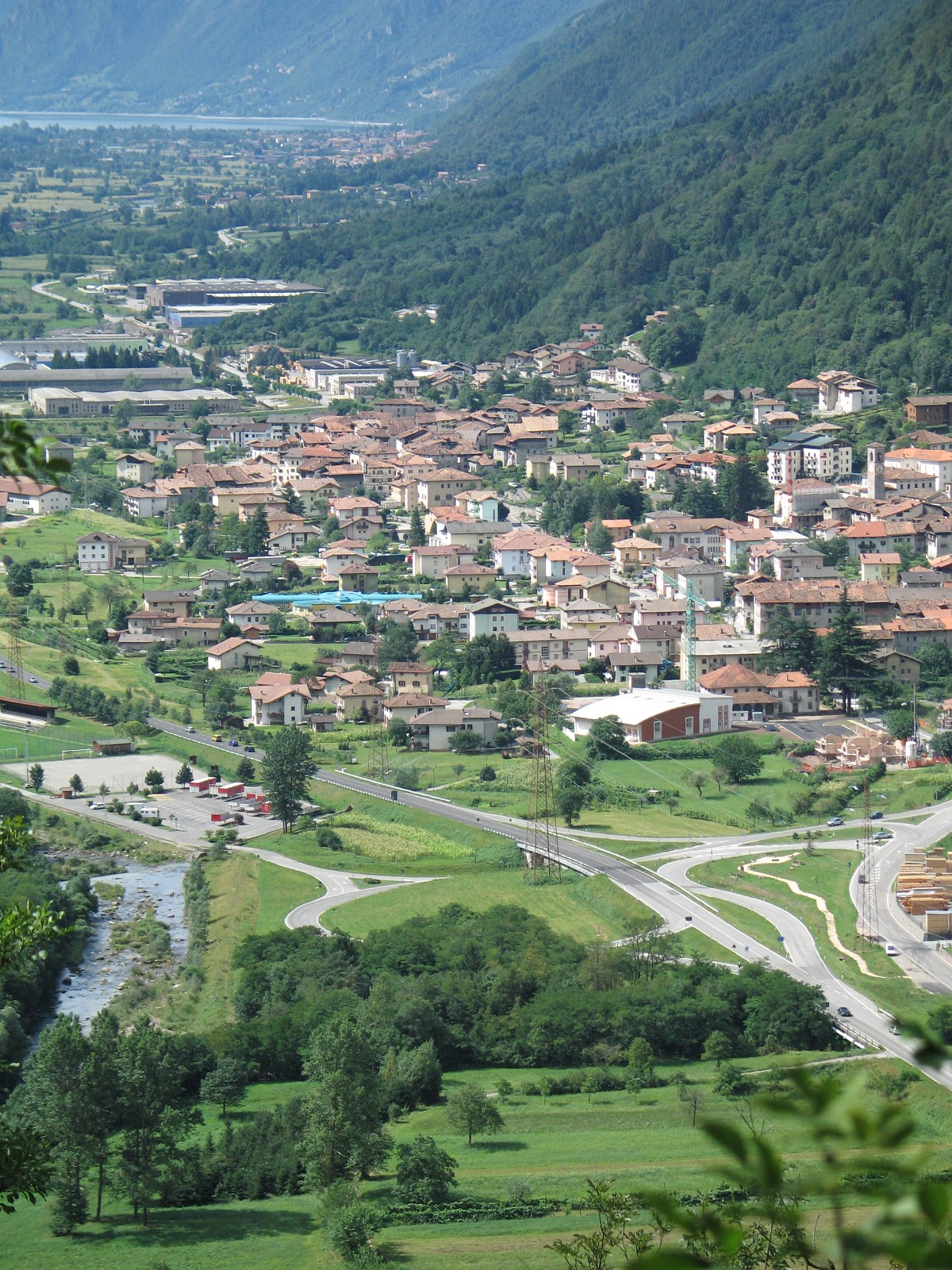 Condino, Trentino Alto Adige, Italia